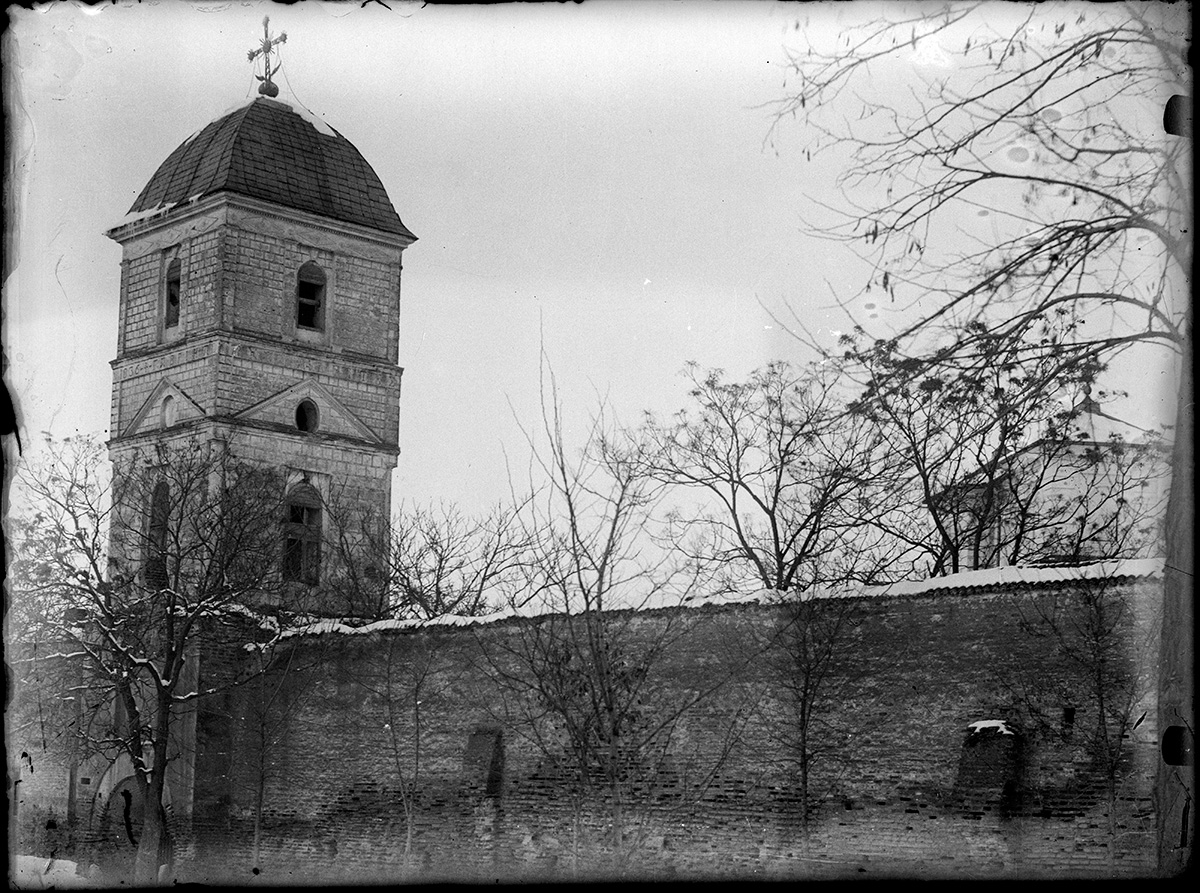 Zidul Mănăstirii Slobozia